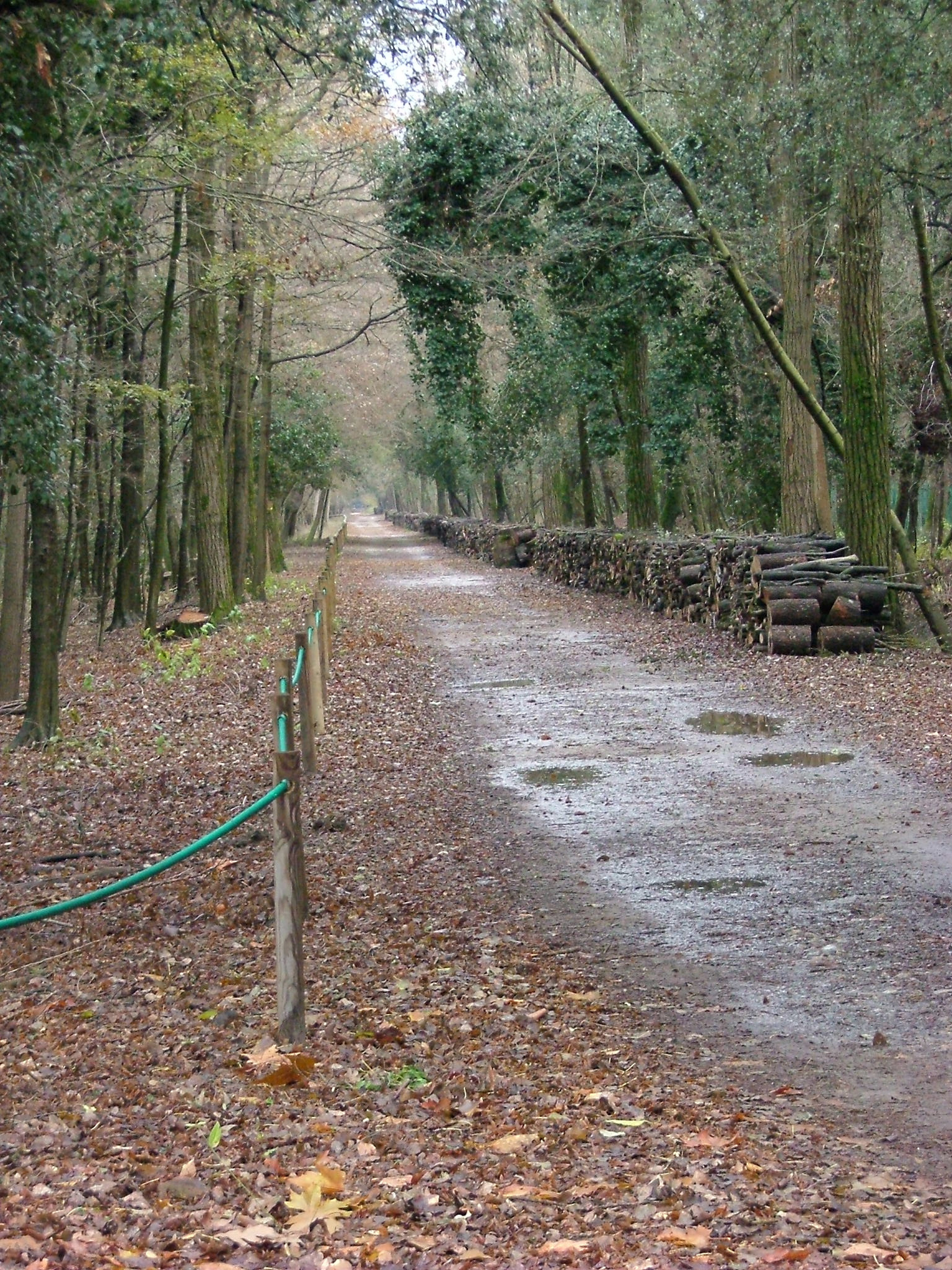 Il Bosco della Mesola